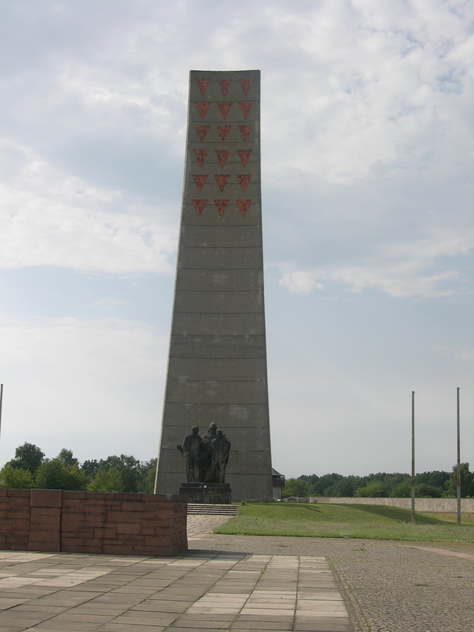 Monumento a los presos de distintas nacionalidades del campo de concentracion.